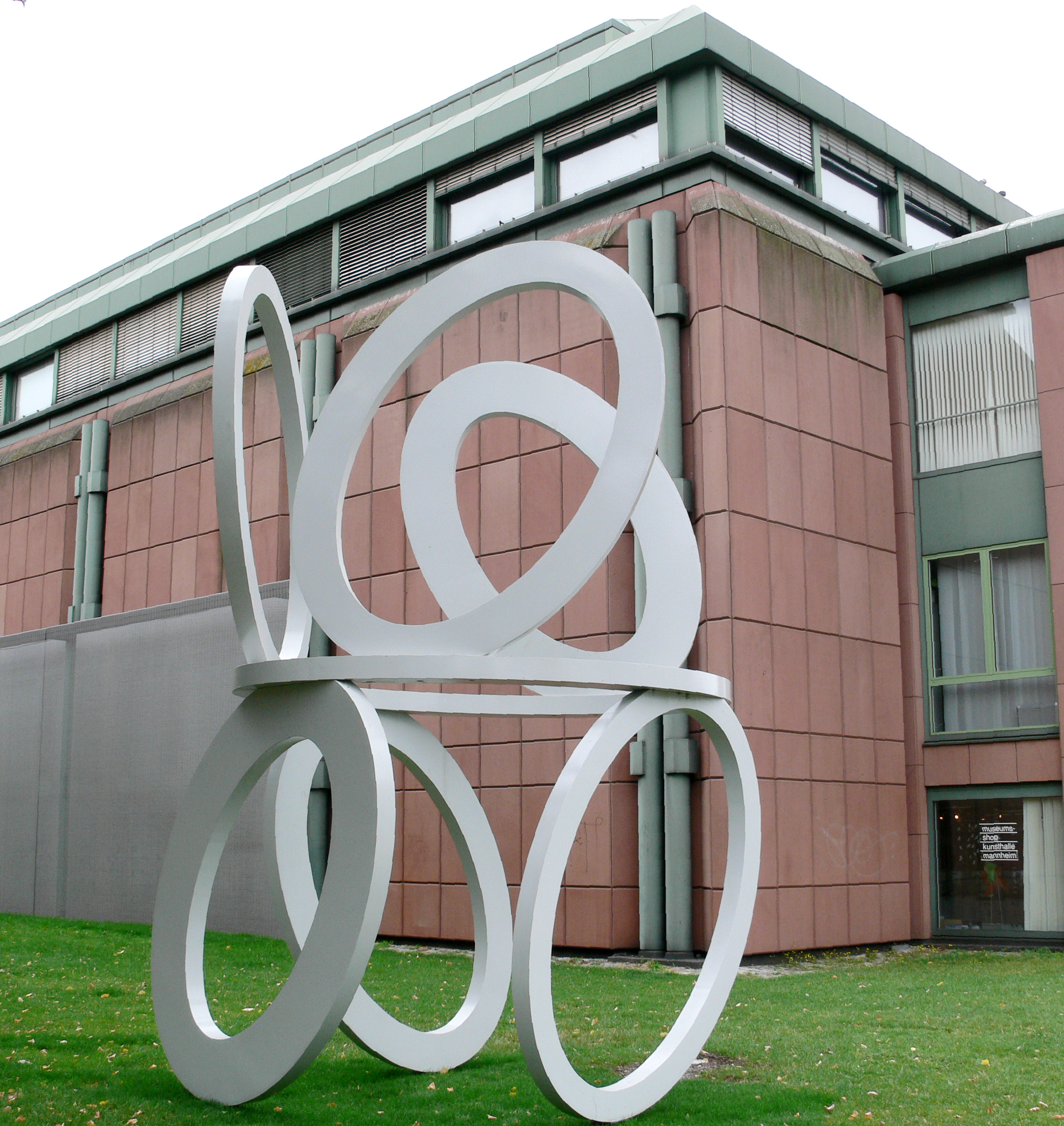 Nigel Hall, „Slow Motion“, Stahl, 2001, Kunsthalle Mannheim, aufgestellt am Friedrichsplatz (vor der Kunsthalle), Mannheim